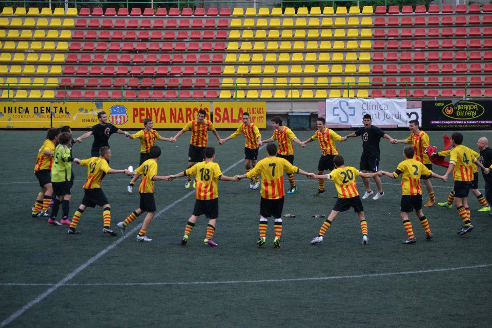 Celebrando el titulo